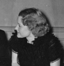 ADN/ZB/Archiv Im faschistischen Deutschland 1938 Kameradschaftsabend anläßlich der Tagung der Reichsfilmkammer in der Kameradschaft der Deutschen Künstler in Berlin am 4. März 1938; v.l. Fita Benkhoff, der Reichsfilmdramaturg von Demandowsky und Hilde Krüger. 3006-38 [Scherl Bilderdienst]